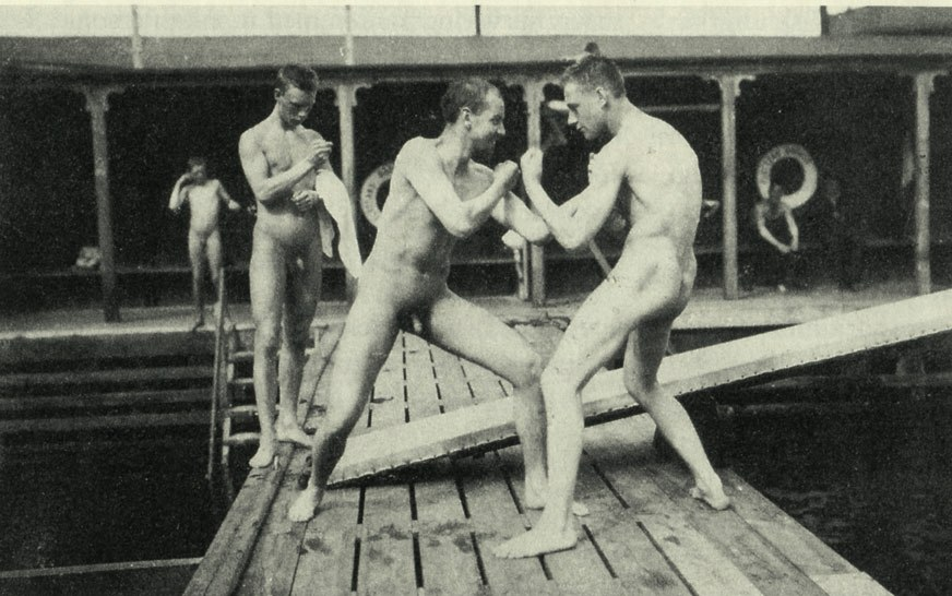 Photographie d'Eugène Jansson, Boxeurs nus dans l'établissement de bains, vers 1905 (Flottans Badhus, Stockholm).